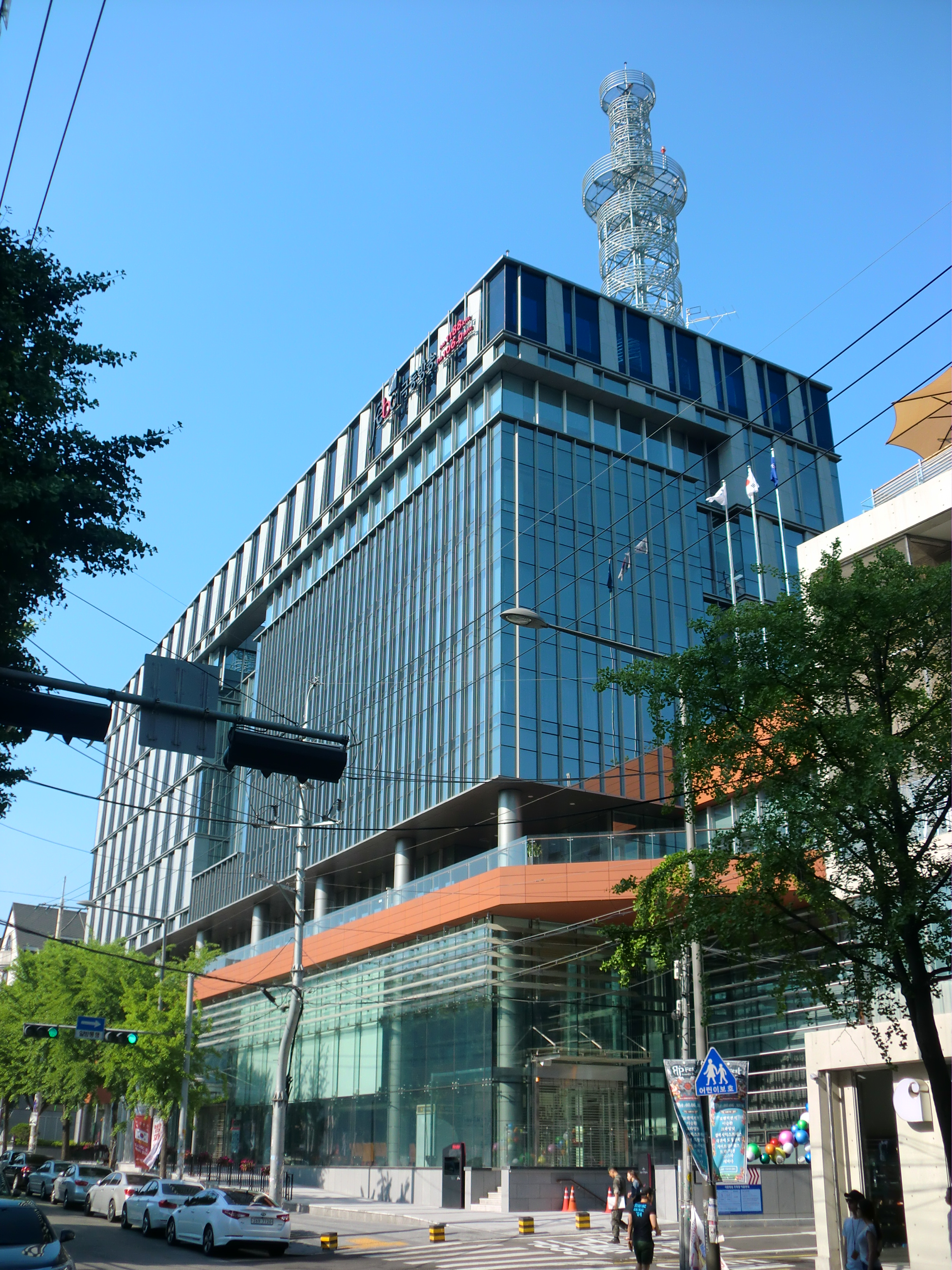 서울특별시 마포구에 있는 극동방송